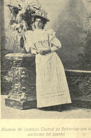 Uniforme de las alumnas del Instituto Normal Central para Señoritas